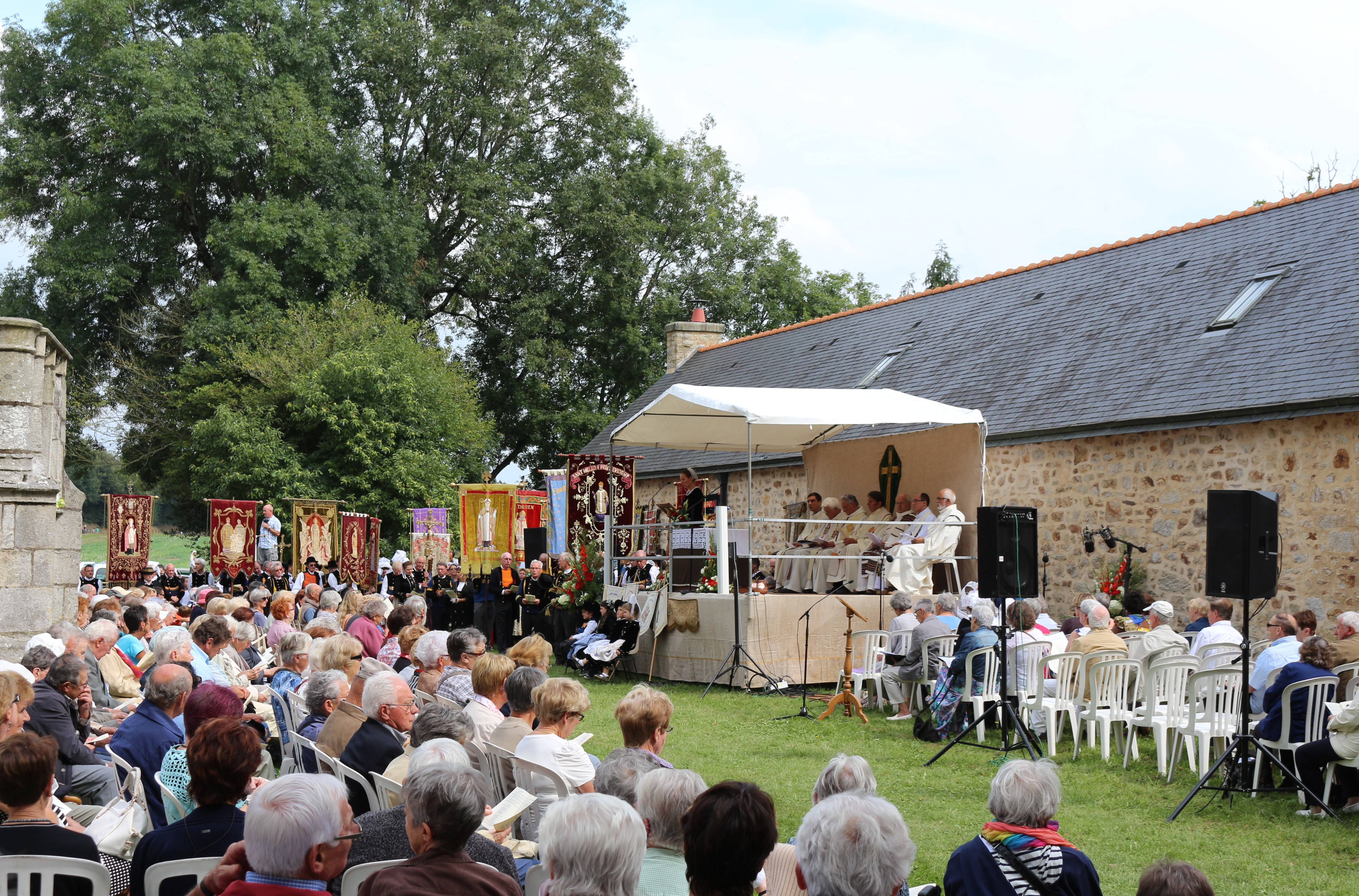 Prière collective du dimanche après-midi lors du grand pardon de Notre-Dame de Kerdévot, commune d'Ergué-Gabéric, Finistère, Bretagne, France.